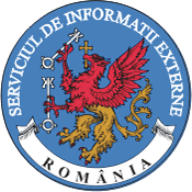 Stema Serviciului de Informaţii Externe.